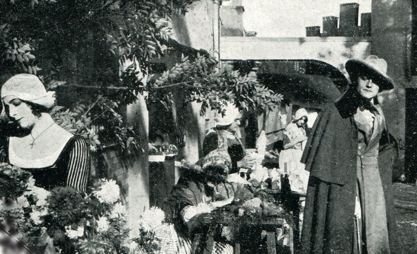 Bianca Bellincioni Stagno ed Enrico Roma ne I due zoccoletti regia di Enrico Roma, 1919 - prod "Tespi Film" Roma